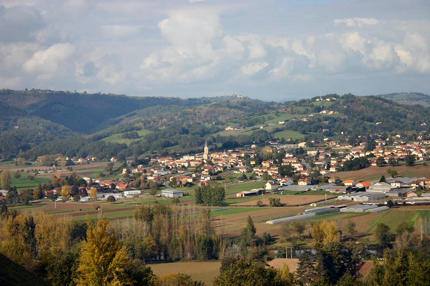 Livinhac le Haut - au premier plan le Lot - vue depuis le carrefour D42-D963